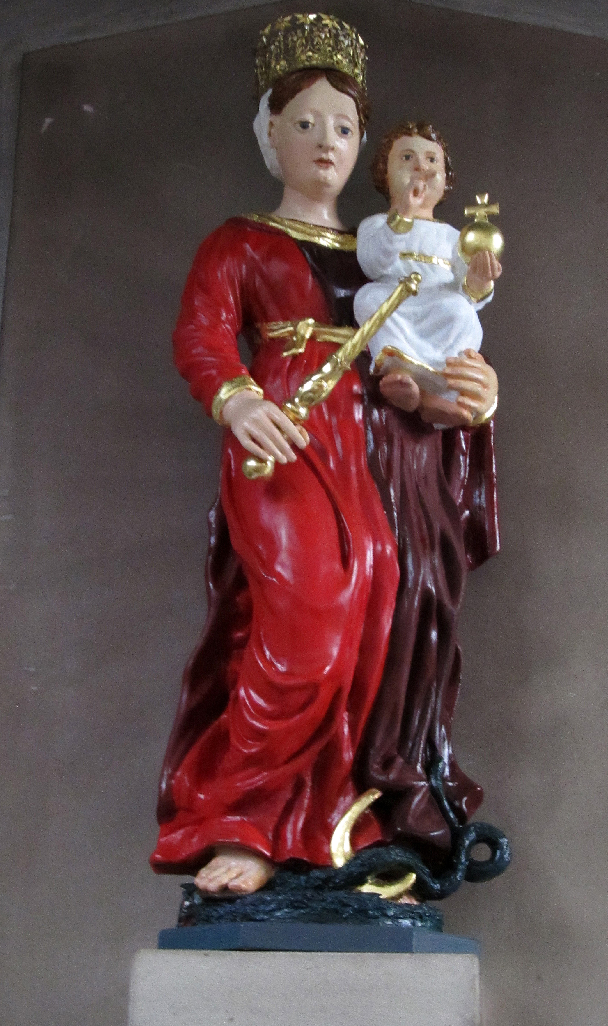 Gnadenbild in der katholischen Pfarr- und Wallfahrtskirche Mariä Himmelfahrt in Kirrberg, Saarland